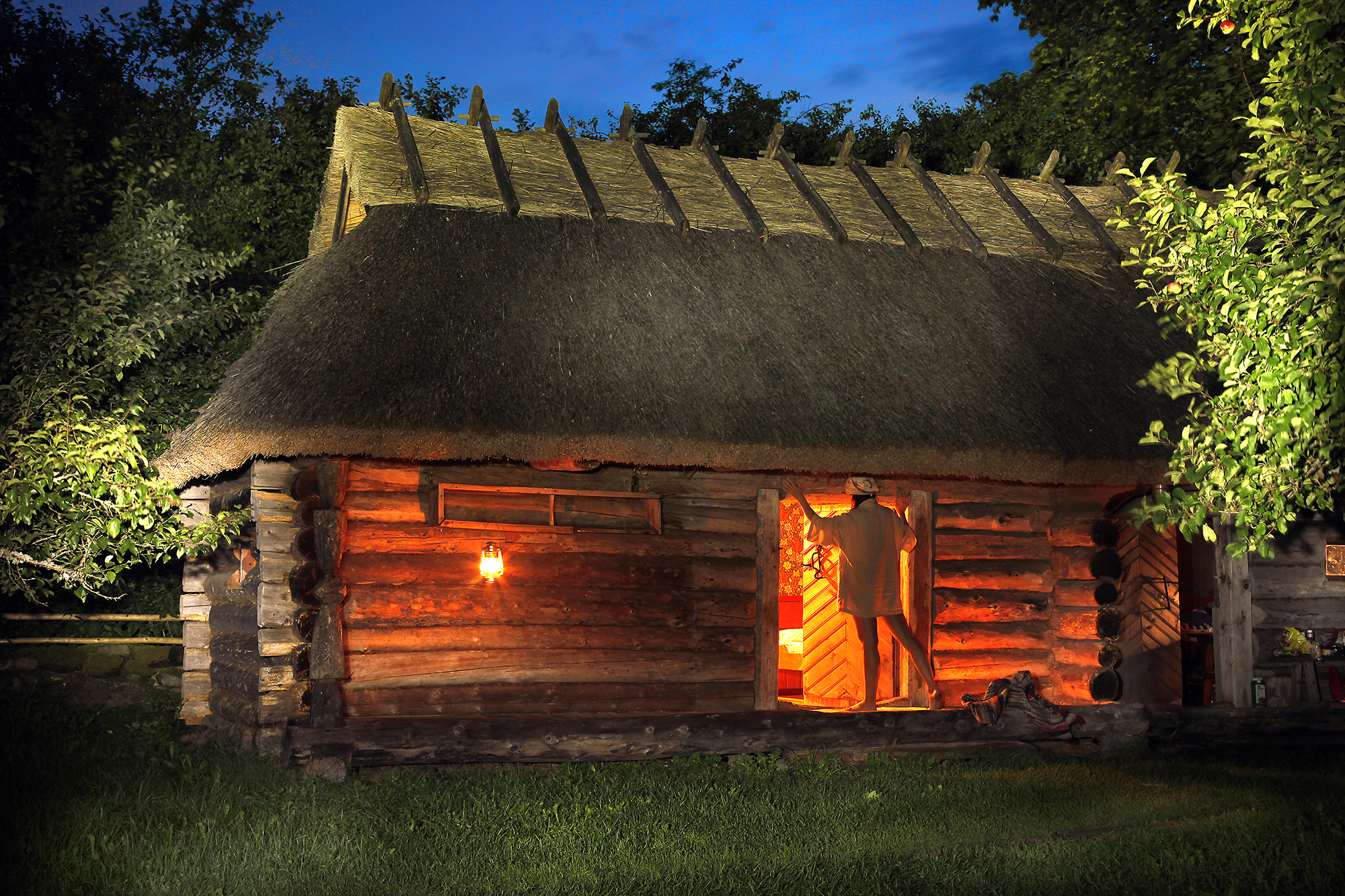 Ruhnu motiivid öös 11